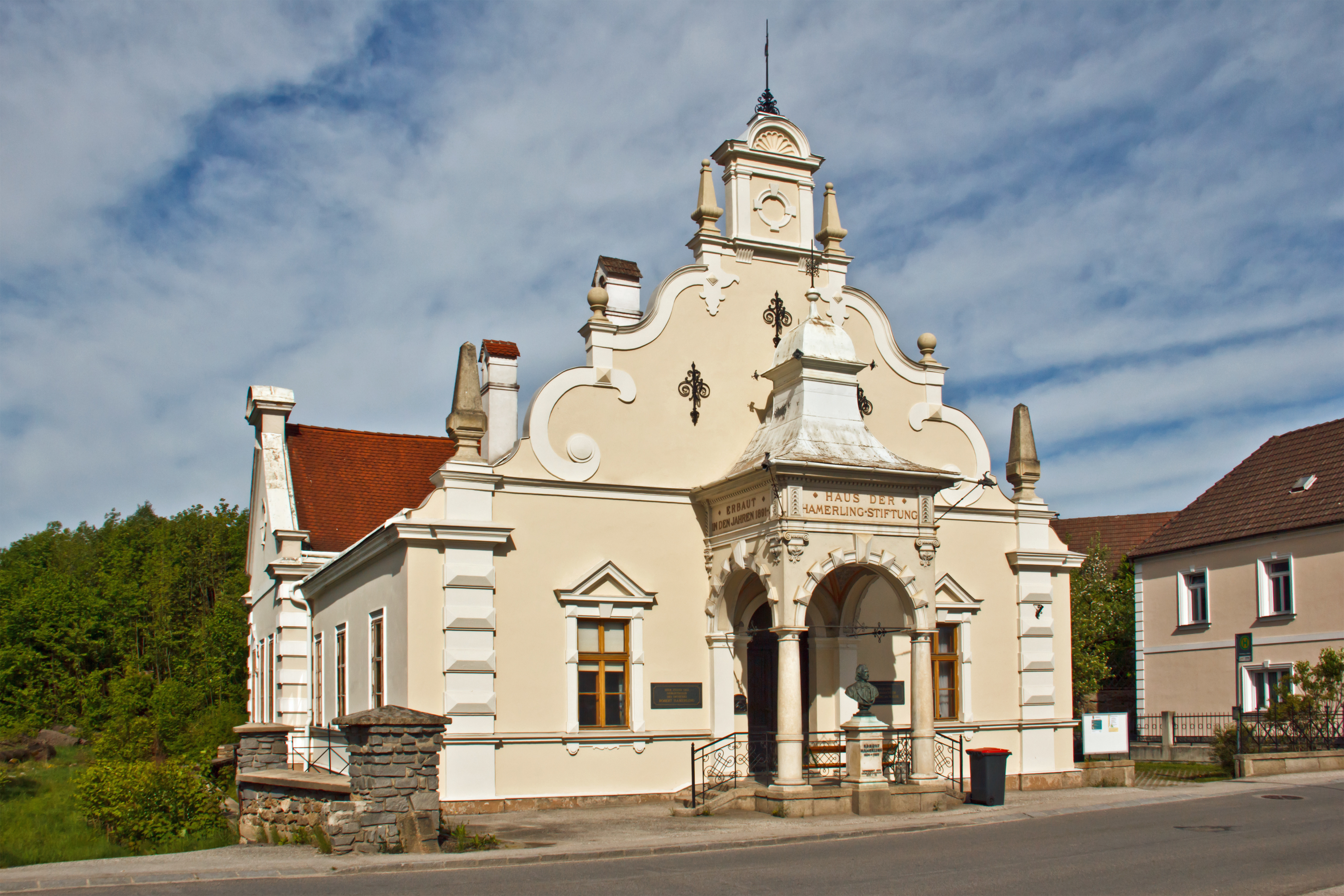 Das von 1891 bis 1893 an Stelle des Geburtshauses von Robert Hamerling erbaute Haus ist im Stil der Neorenaissance gehalten.